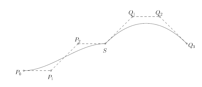 اسپلاین